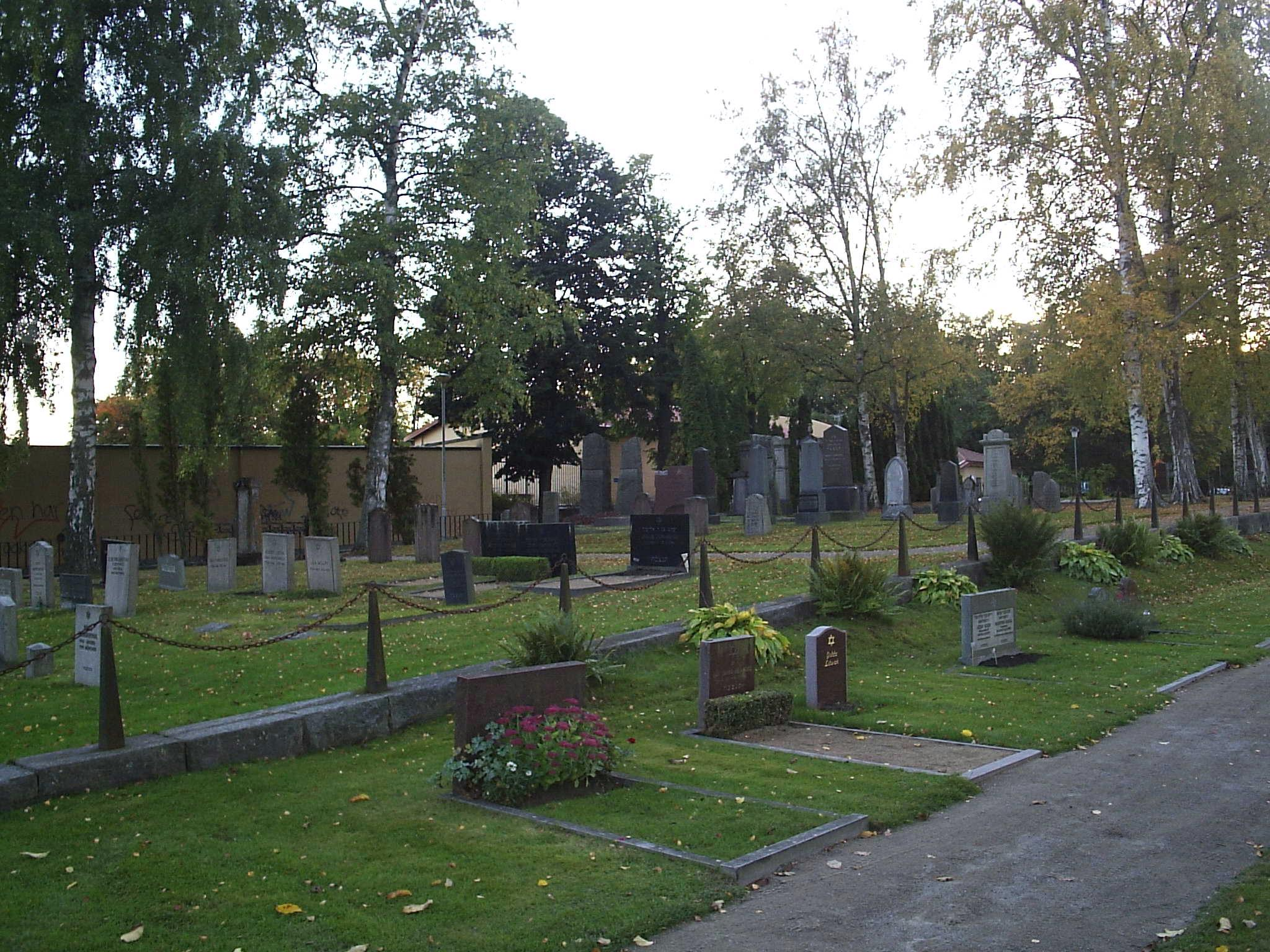 Judiska begravningsplatsen i Norrköping, den 6 oktober 2005.